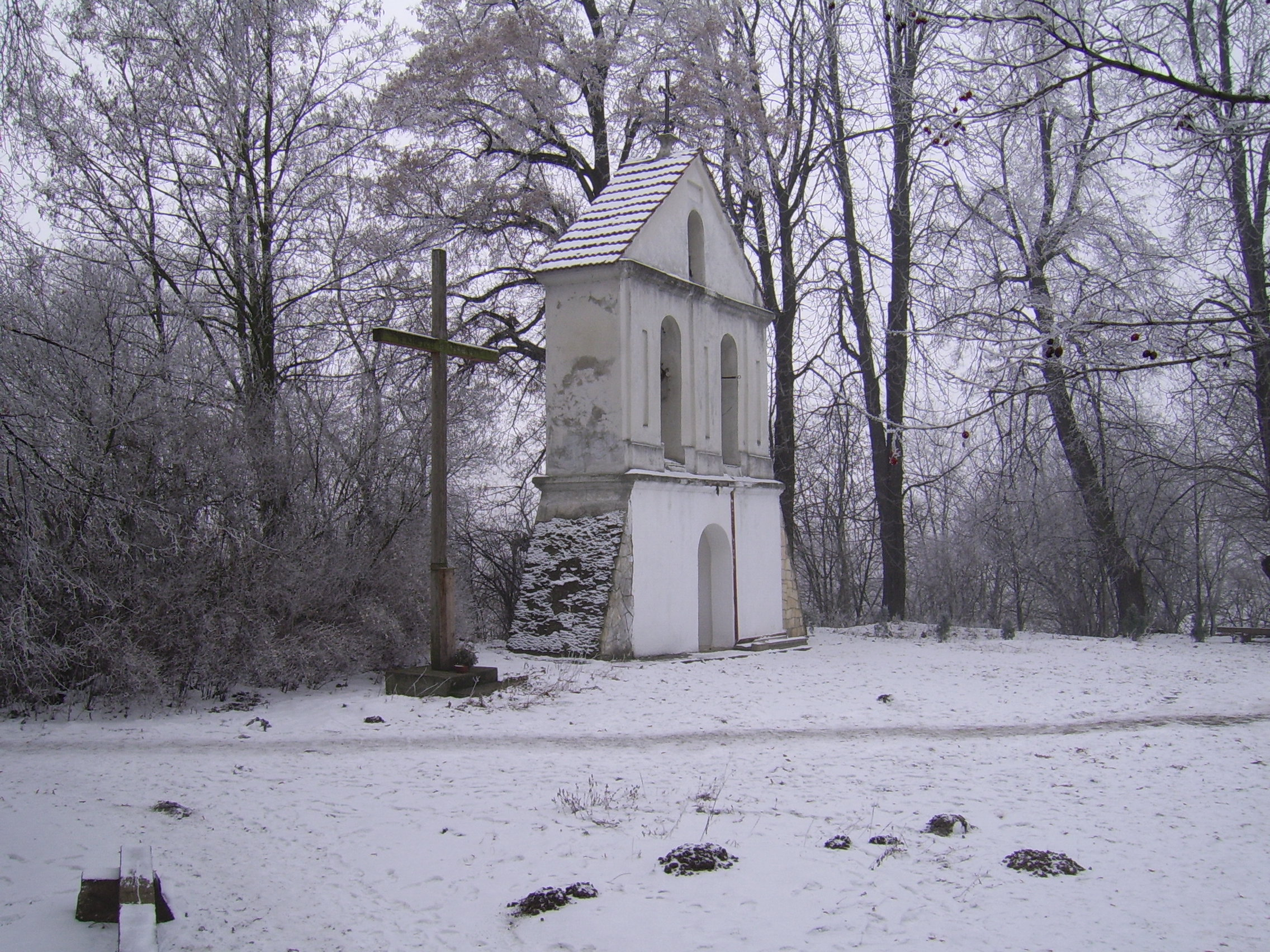 Małoszów (województwo świętokrzyskie) - dzwonnica przy kościele pw. św. Mikołaja.